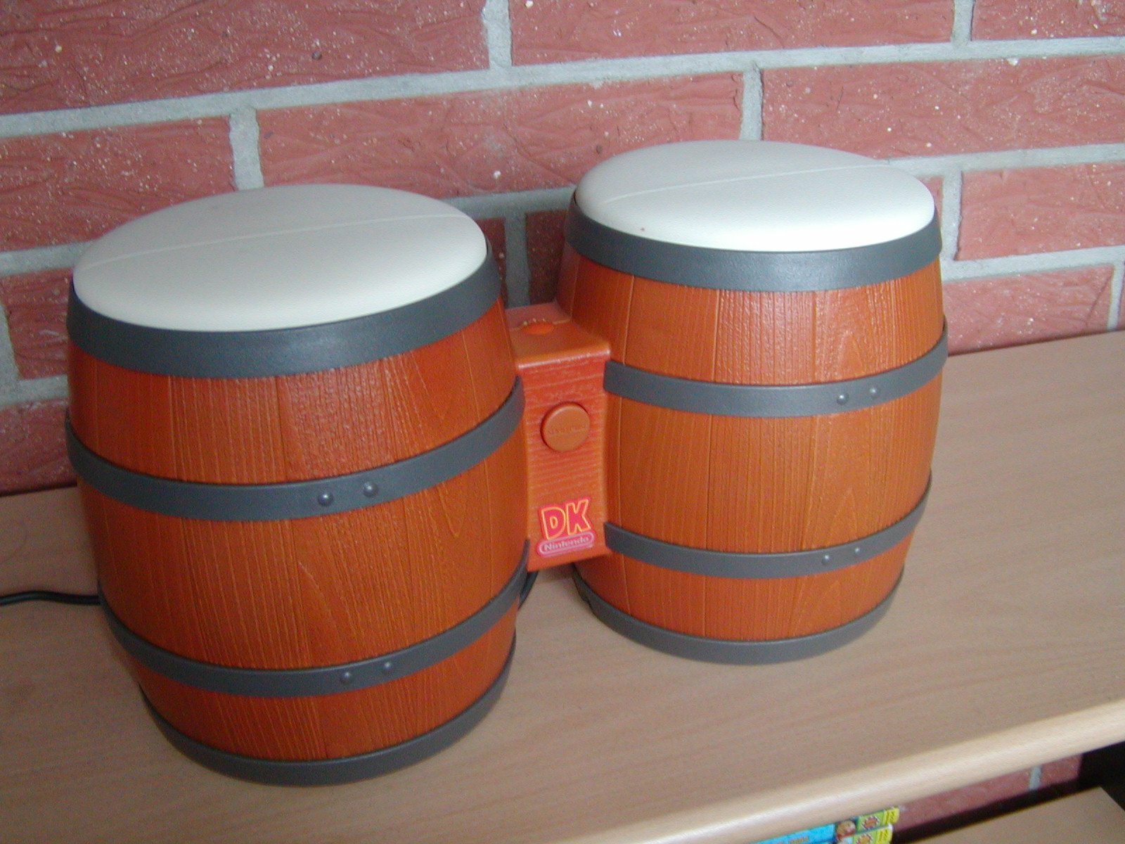 From dewiki "Neue Version von Benutzer:Louie - GFDL Foto der DK-Bongos von Waluigi - GFDL" (Löschen) (Aktuell) 12:16, 24. Apr 2005 . . Louie (Diskussion) . . 1600 x 1200 (463791 Byte) (Besseres Bild) (Löschen) (Zurücksetzen) 14:30, 7. Mär 2005 . . Waluigi (Diskussion) . . 1998 x 1374 (196485 Byte) (Foto der DK-Bongos von Benutzer:Waluigi - GFDL)